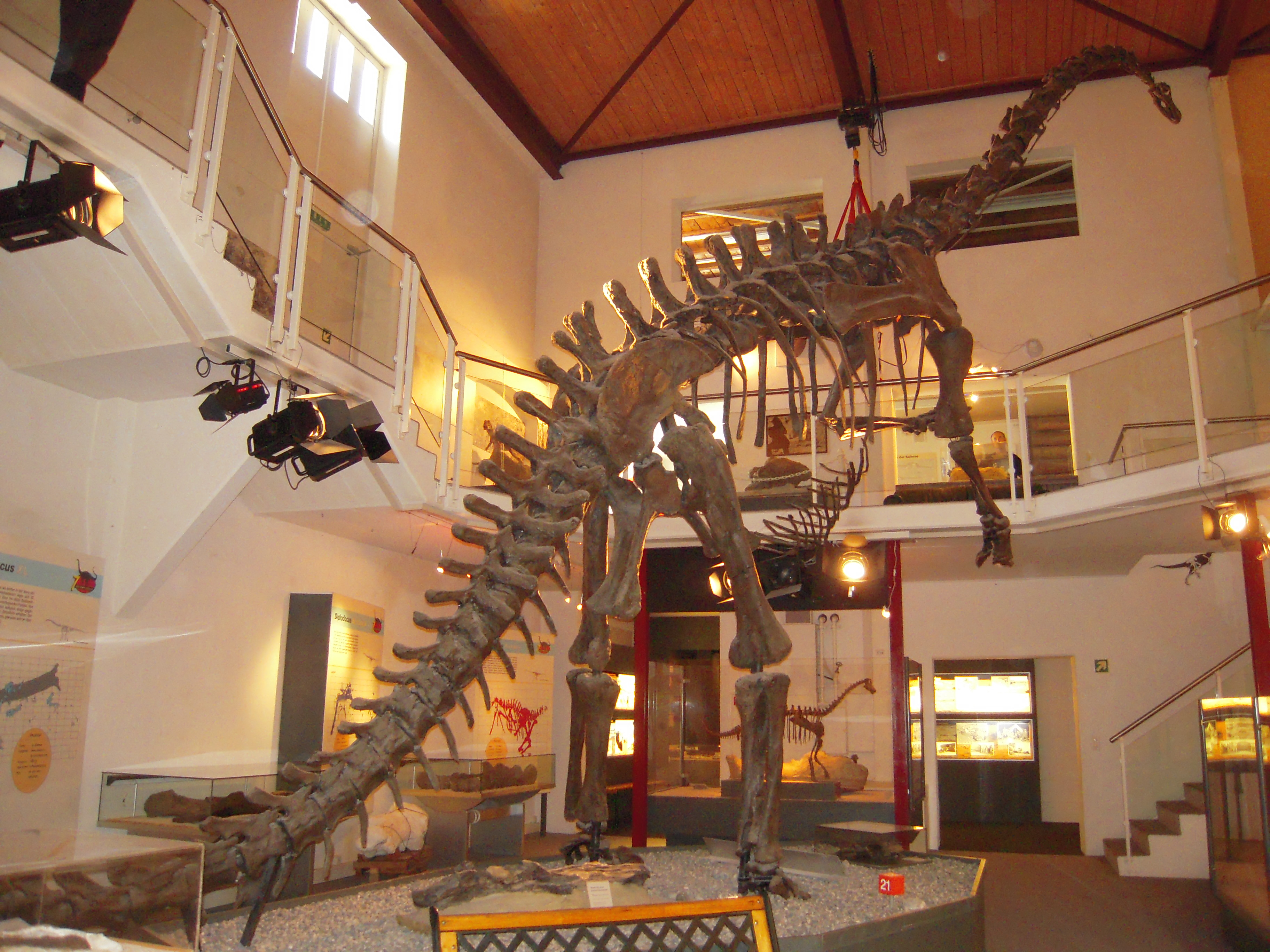 Skelettrekonstruktion von Kaatedocus